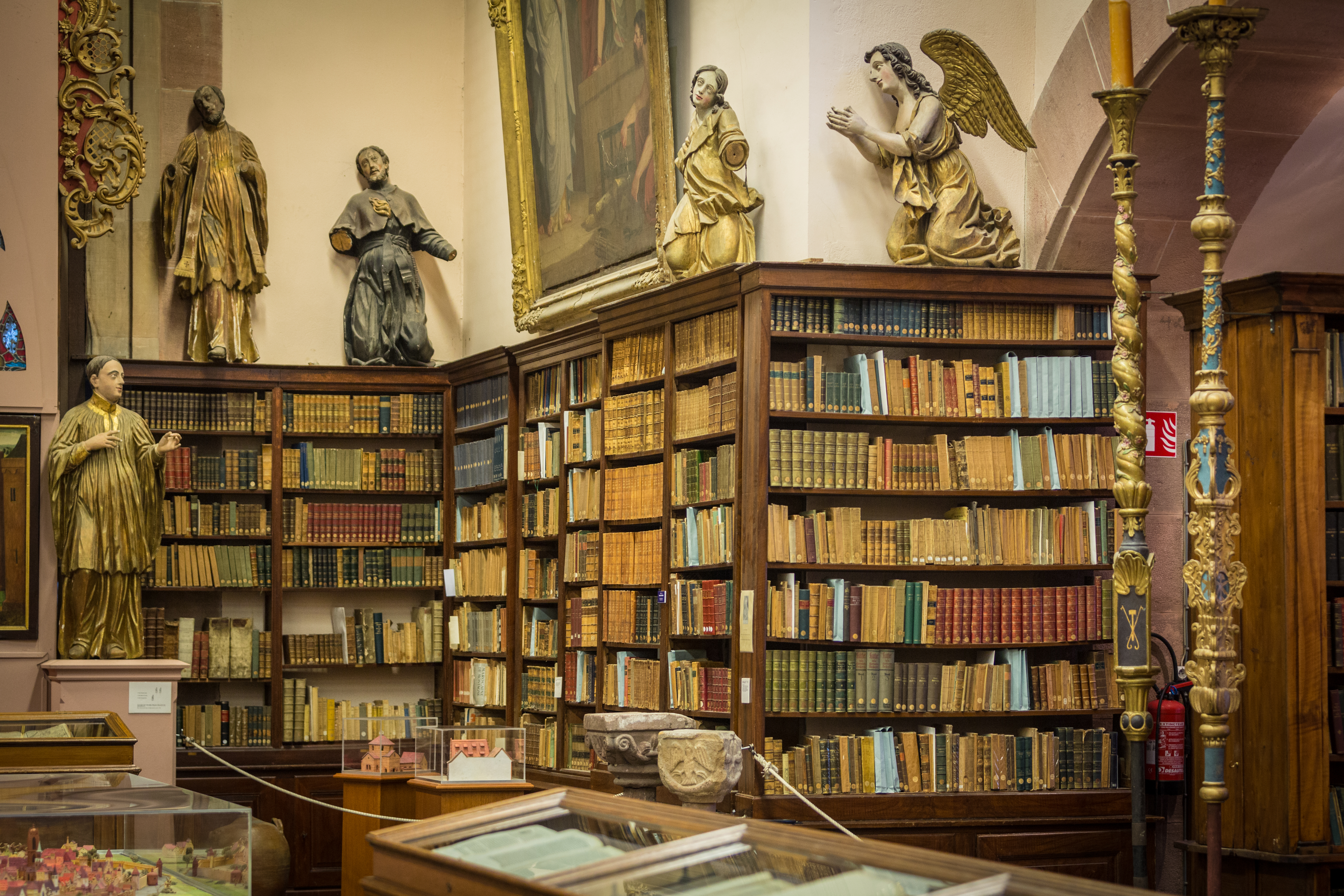 Bibliothèque humaniste de Sélestat 21 janvier 2014. Descriptions à venir